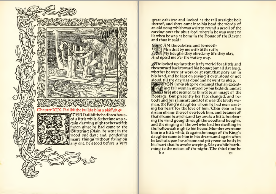 Pages 130 et 131 du roman de William Morris "The Story of the Glittering Plain" ("L'Histoire de la Plaine étincelante"), dans sa deuxième édition en 1894 enrichie par des illustrations de Walter Crane.